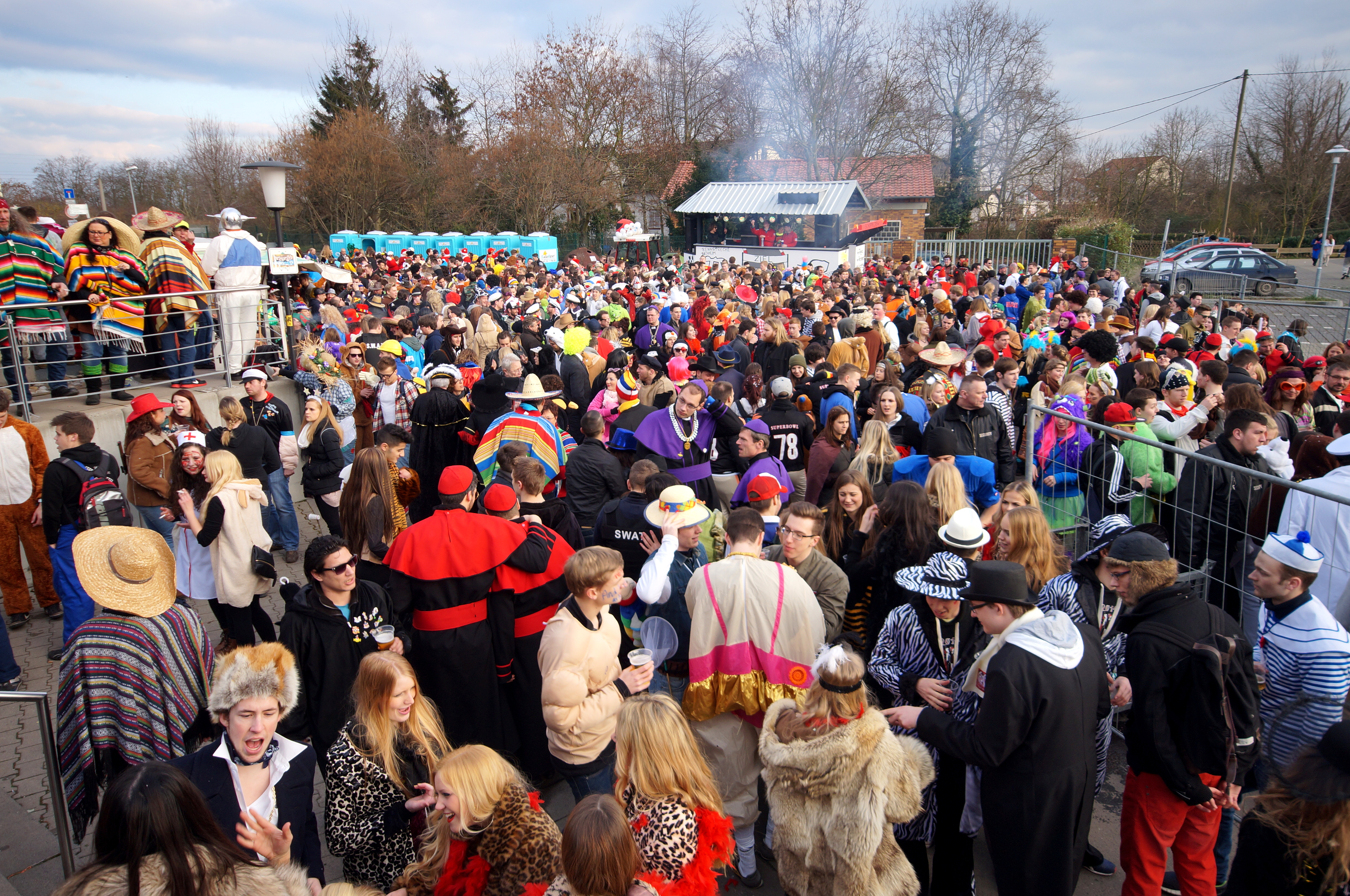 Feiern vor dem Dorfgemeinschaftshaus in der Mühlstraße nach dem Fastnachtsumzug in Guntersblum